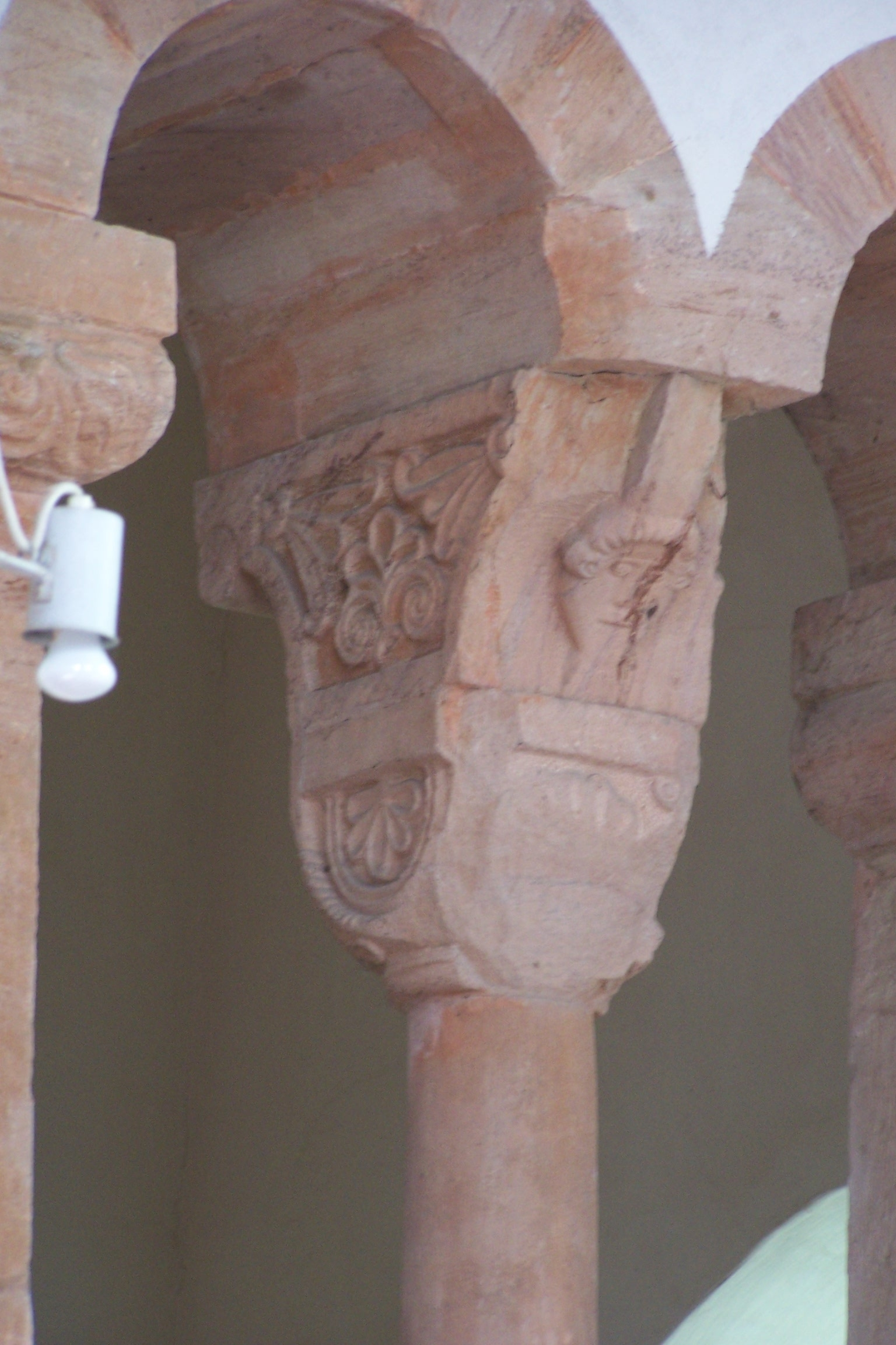 Romanisches Kapitell im Innern der Kirche.